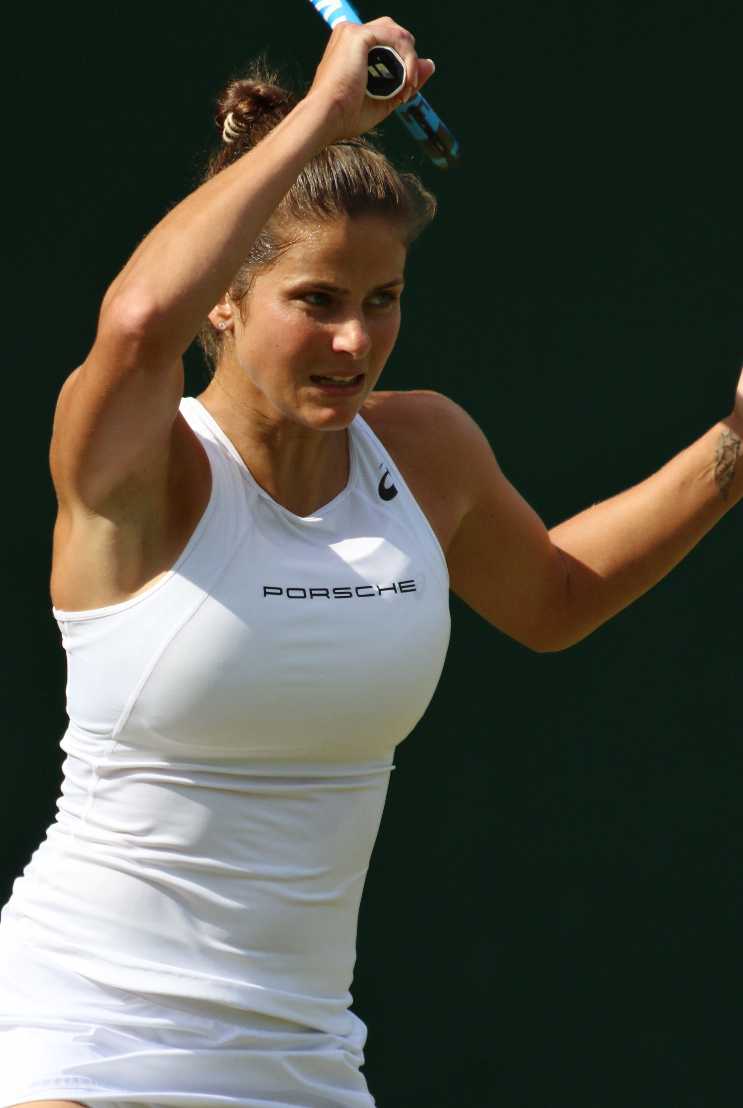 Goerges WM19 (16)